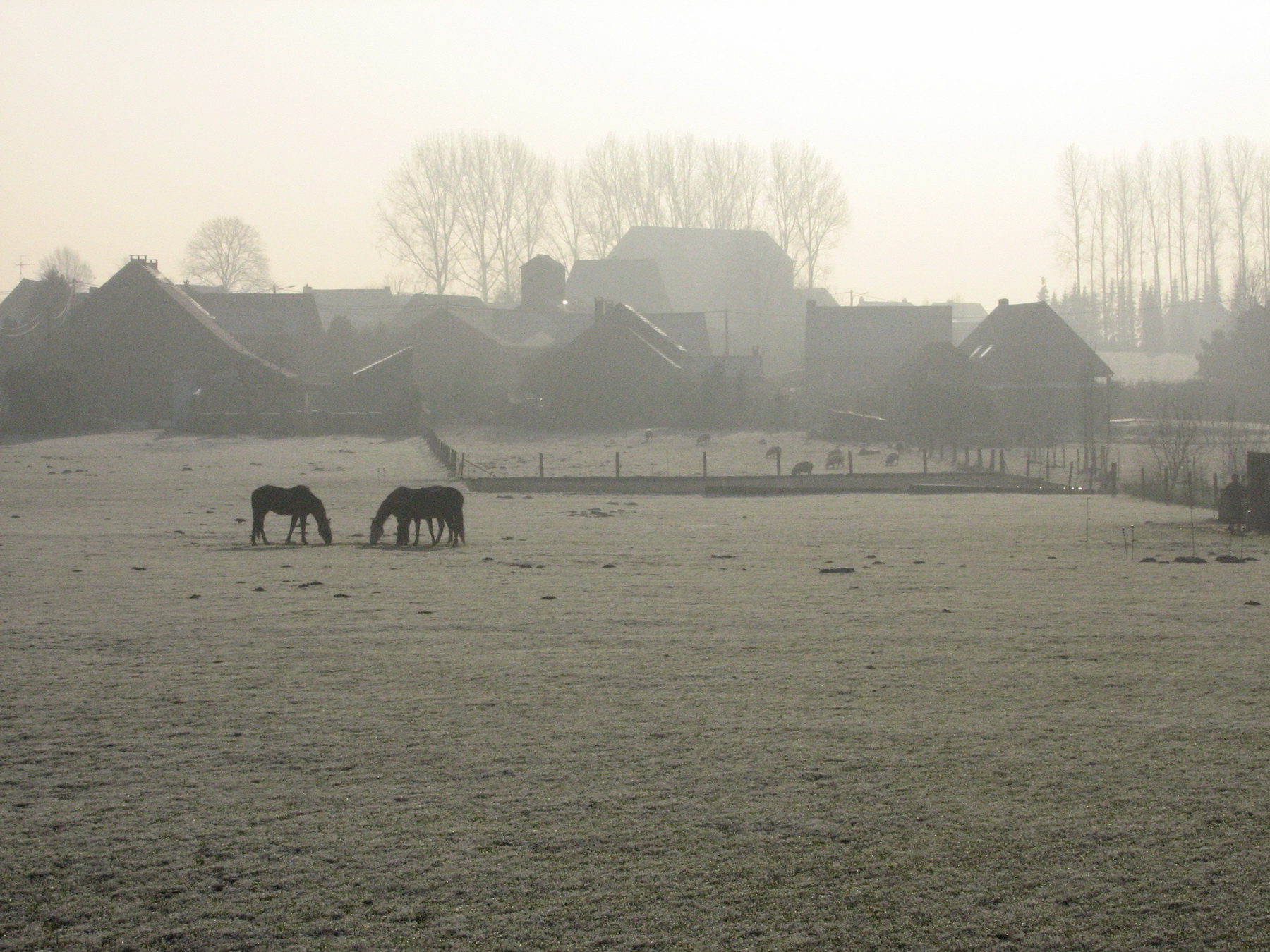 Le hameau d'Autreppe en hiver